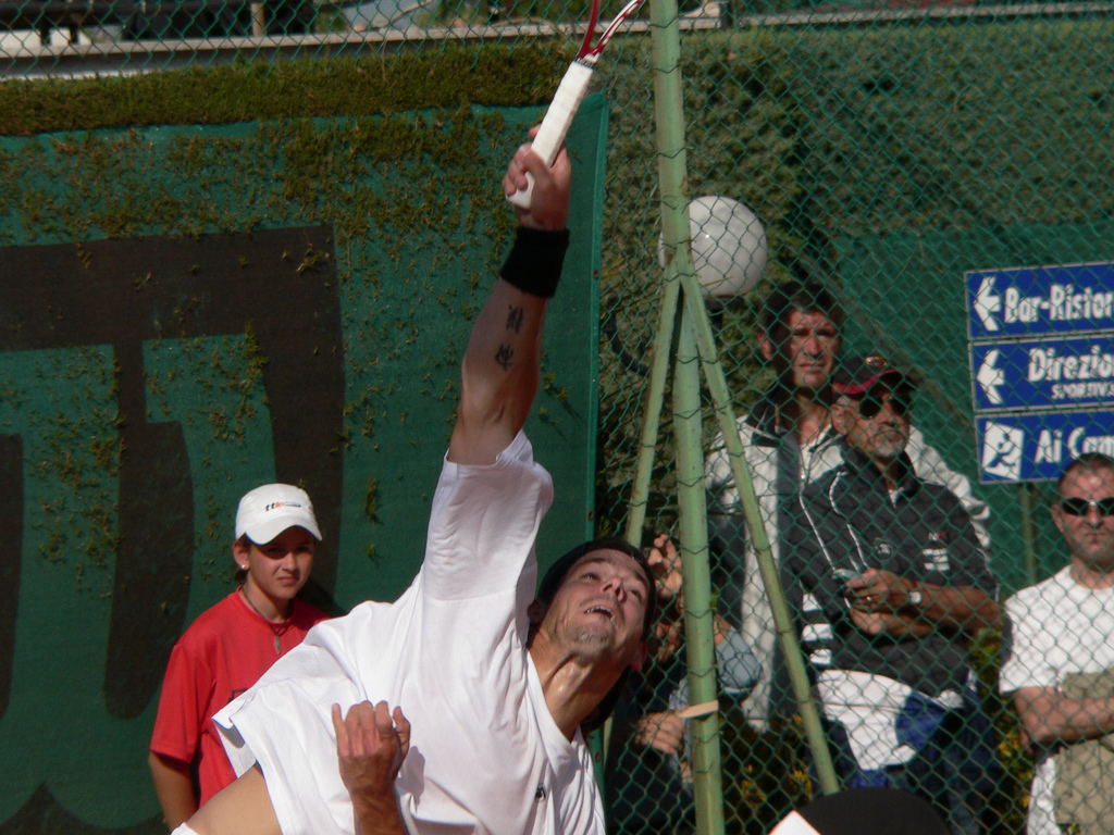 Daniel Koellerer (AUT)